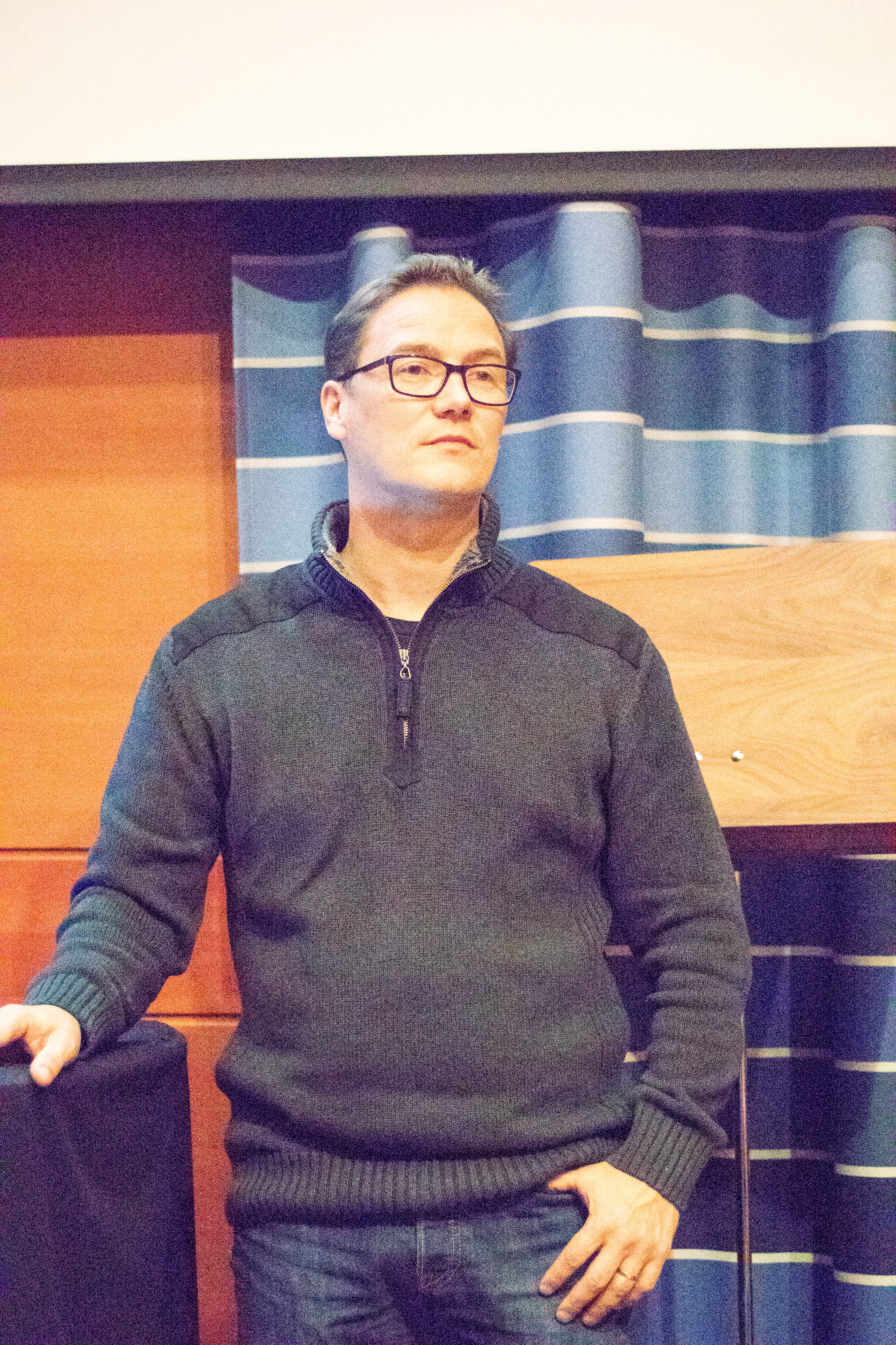 Toni Laaksonen